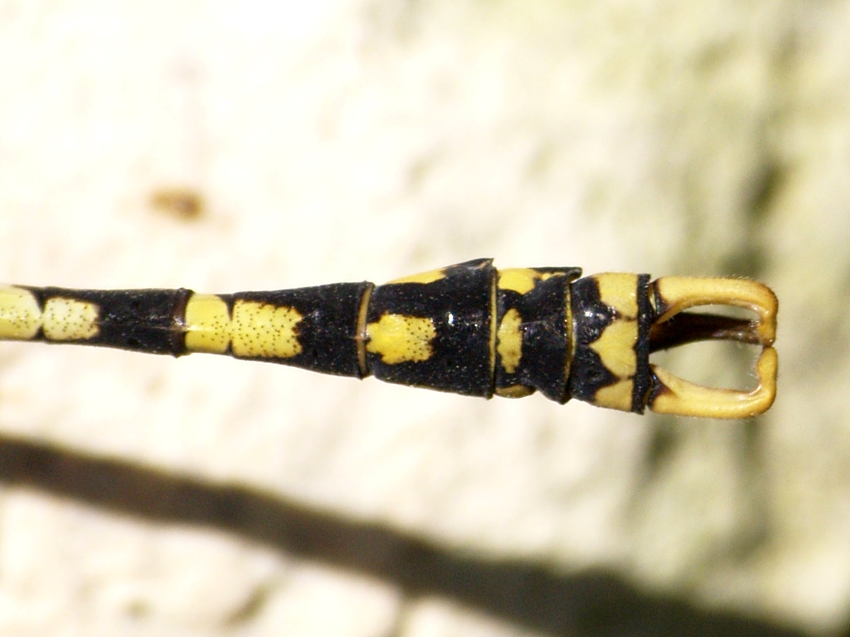 Onychogomphus uncatus detall cercoides